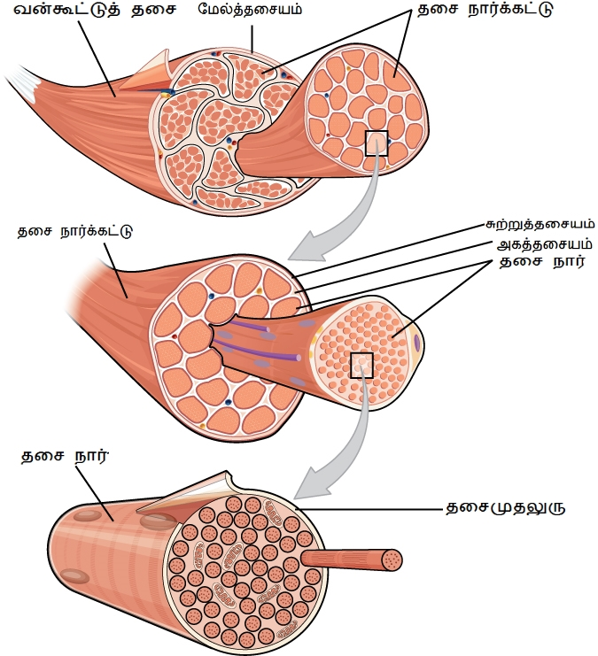 வன்கூட்டுத் தசையிழையம்